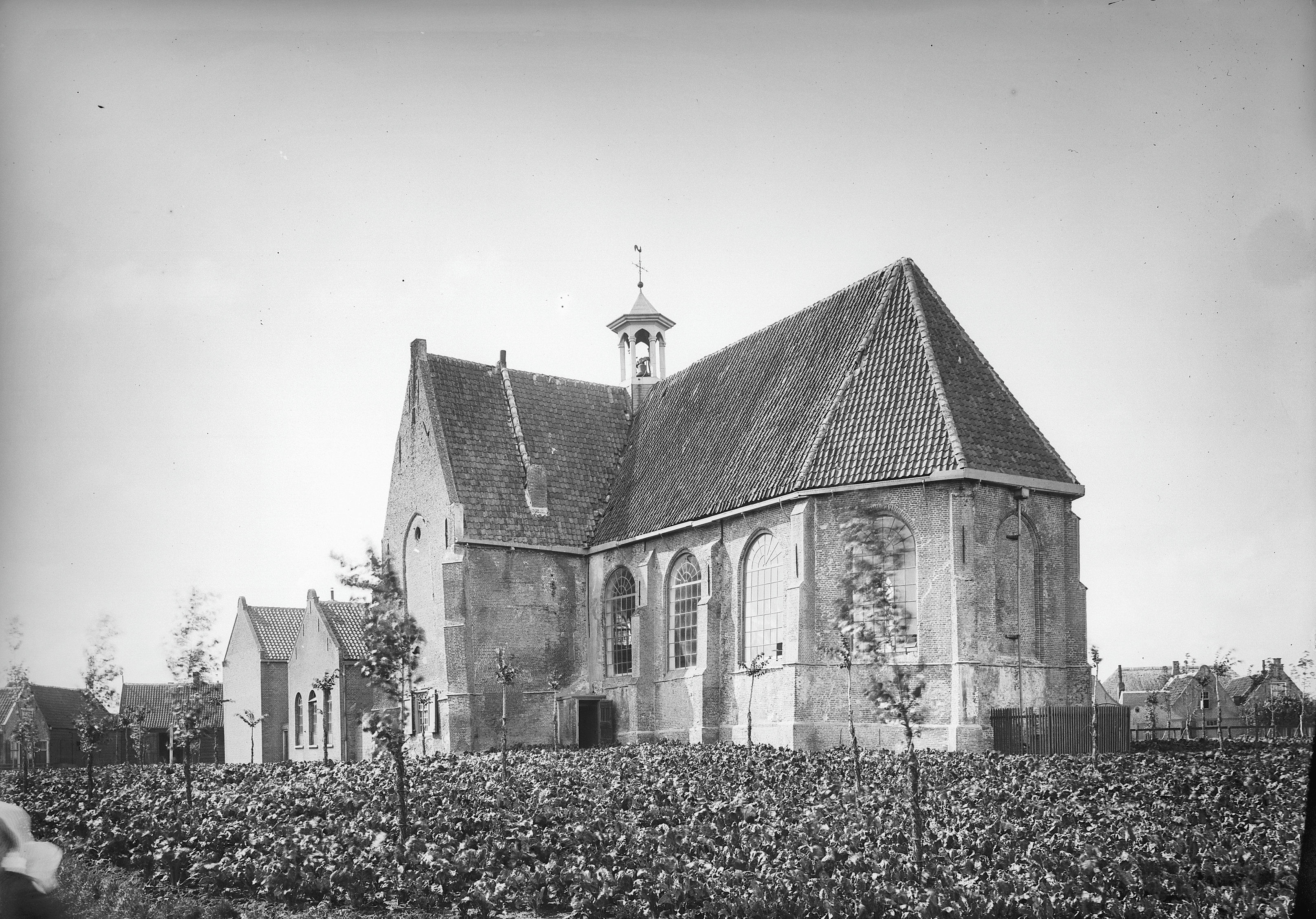 Nederlands Hervormde Kerk: aanzicht (opmerking: Fotonummer 6067)